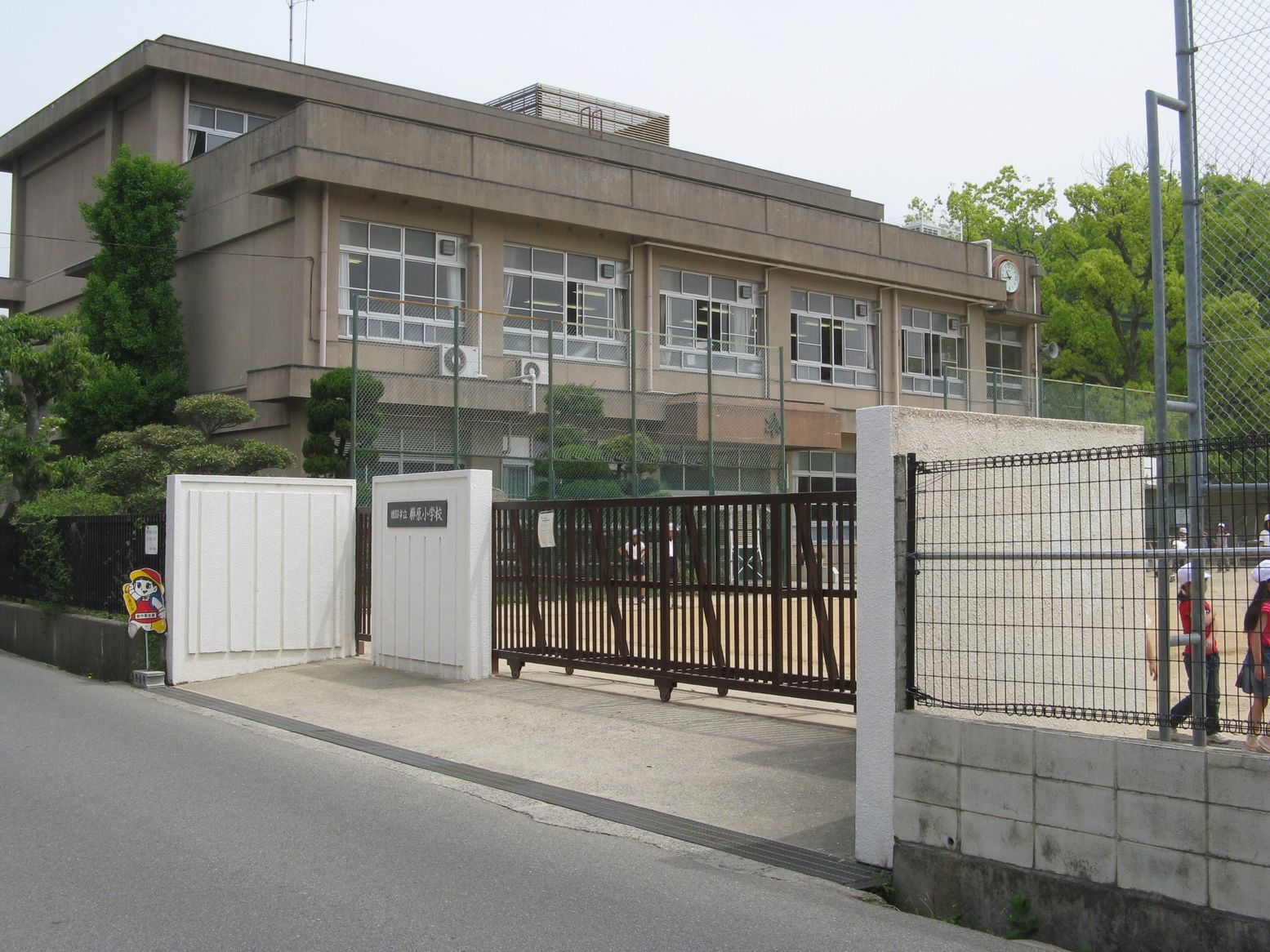 姫路市立勝原小学校